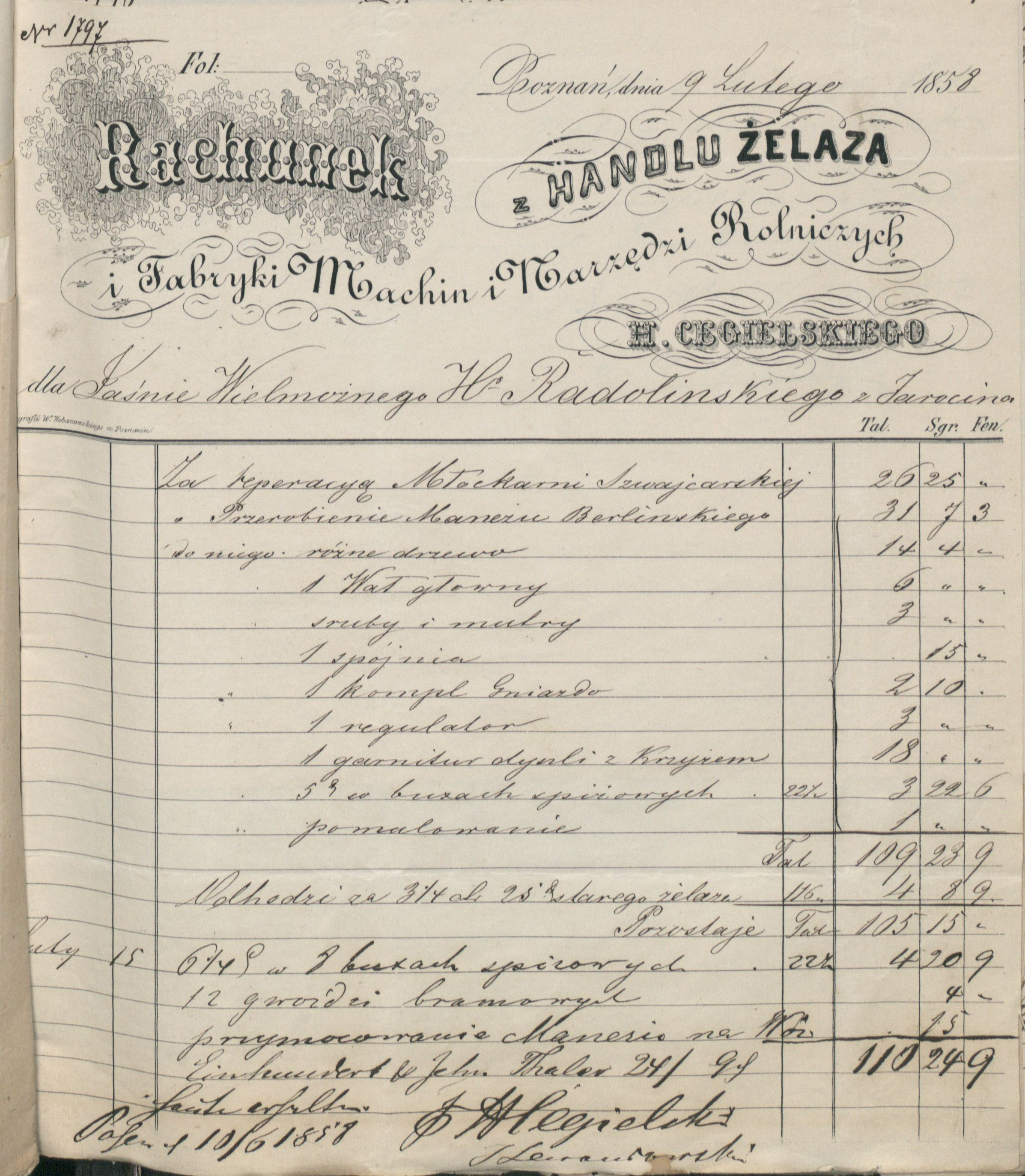 Rachunek ze sklepu H. Cegielskiego